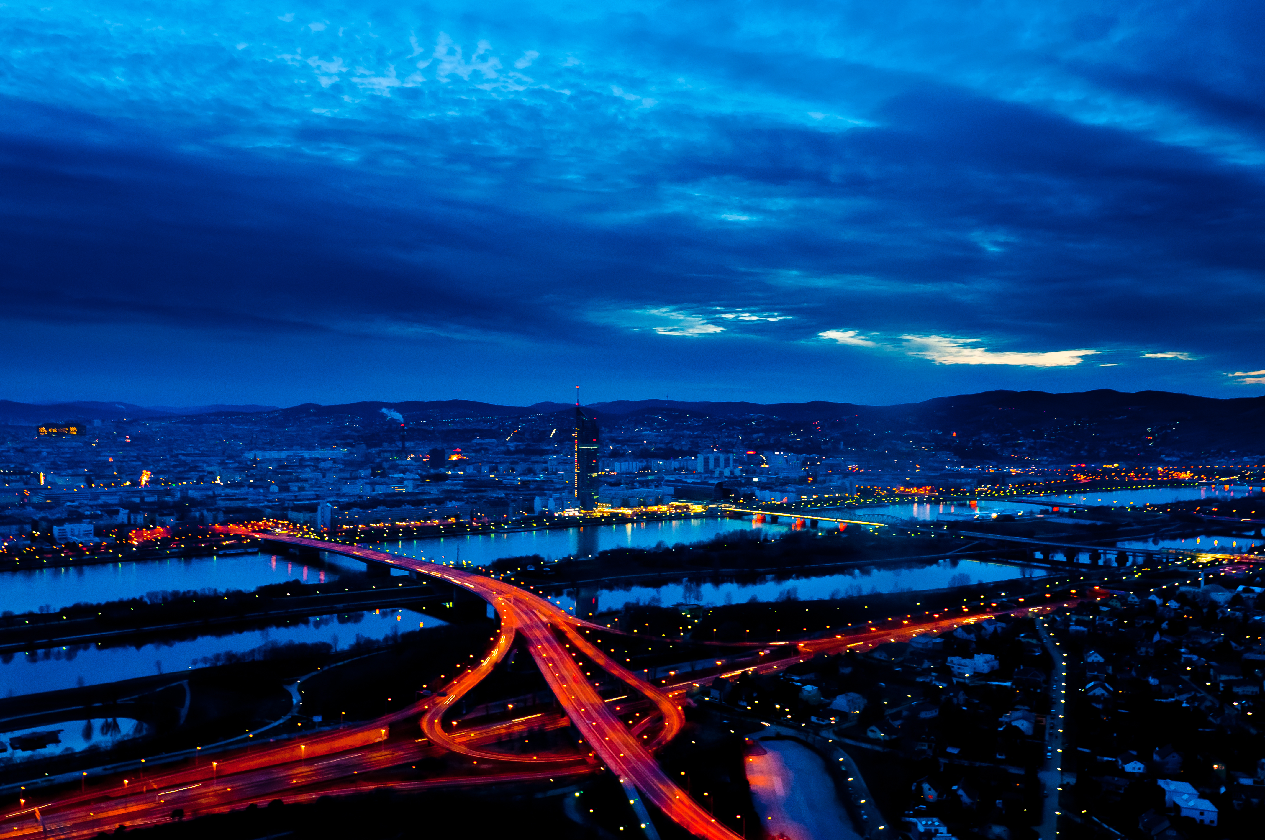 Vienna